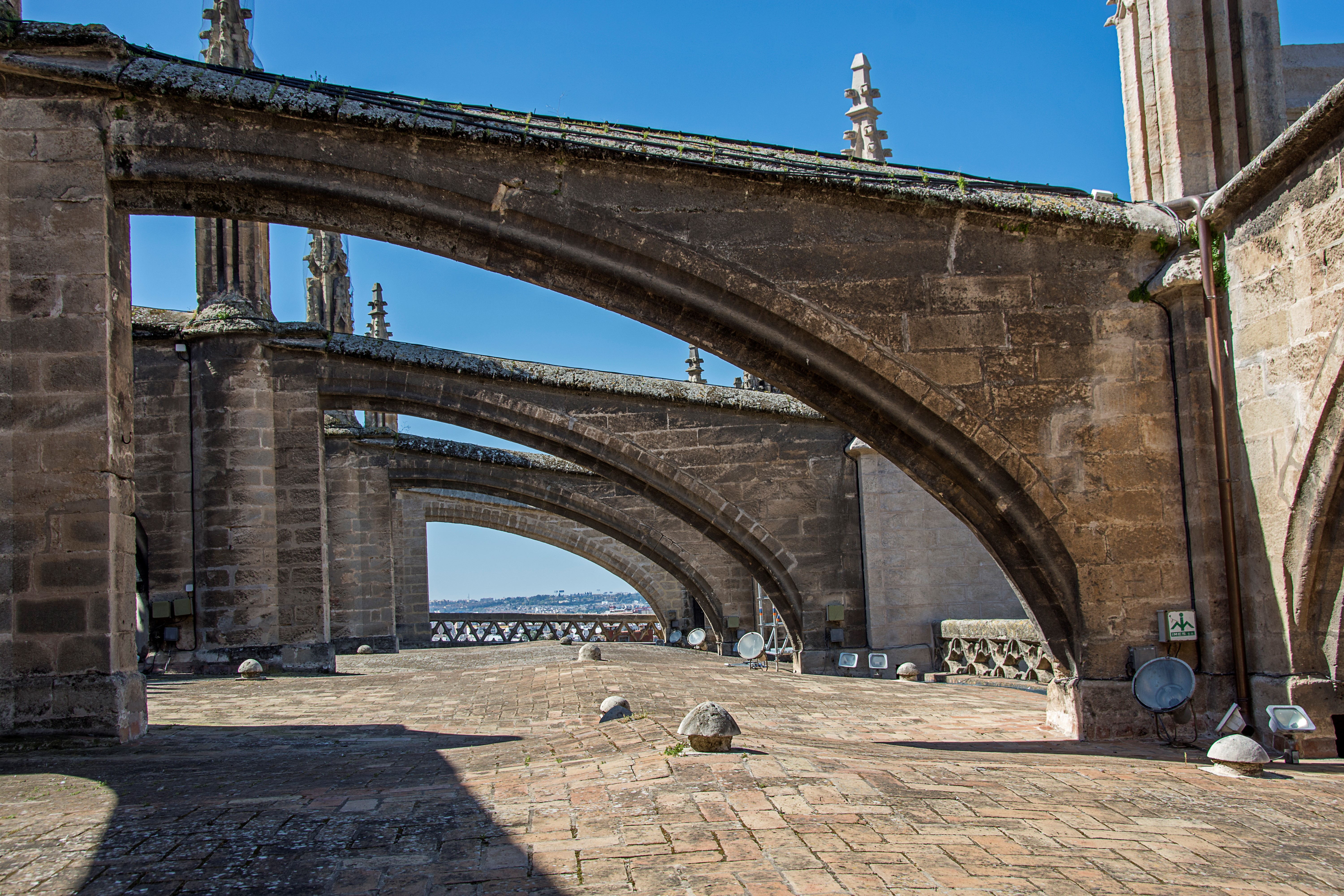 Vista de las cubiertas y los arbotantes de la catedral de Sevilla.